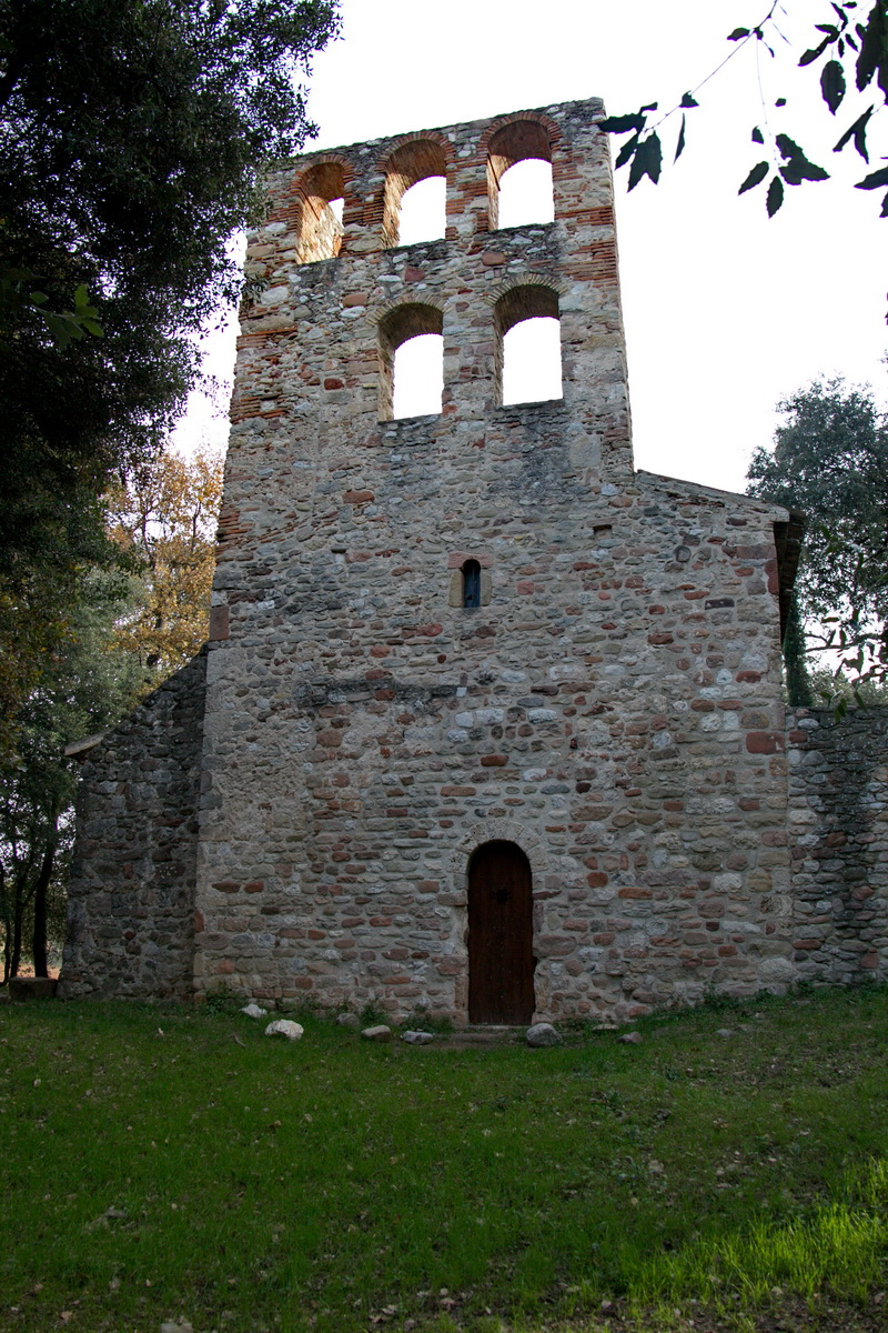 Capella de Santa Justa i Santa Rufina (Lliçà d'Amunt)